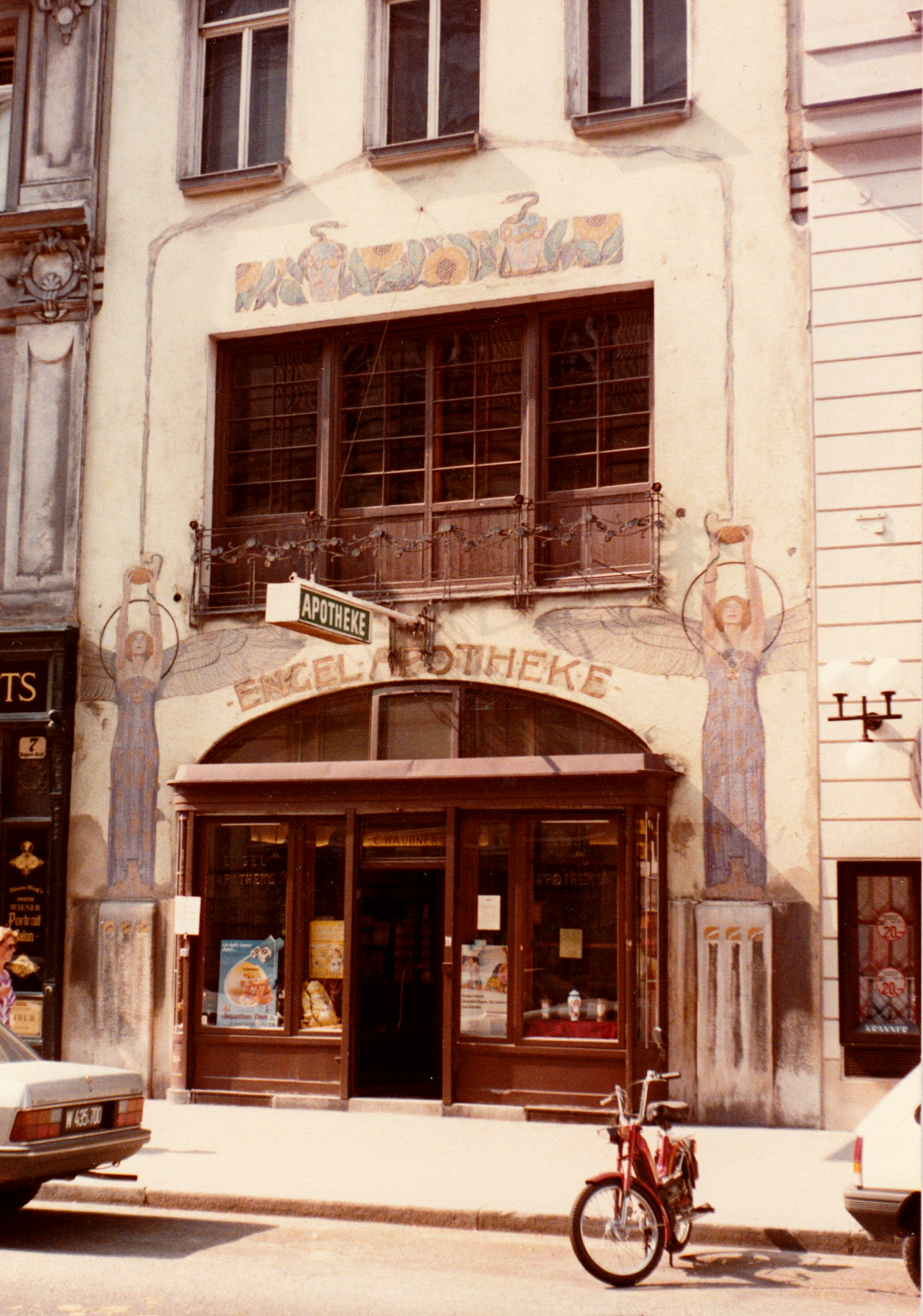 Pharmacy "Zum weißen Engel" - Oskar Laske (1901-1902) - Vienna, Austria